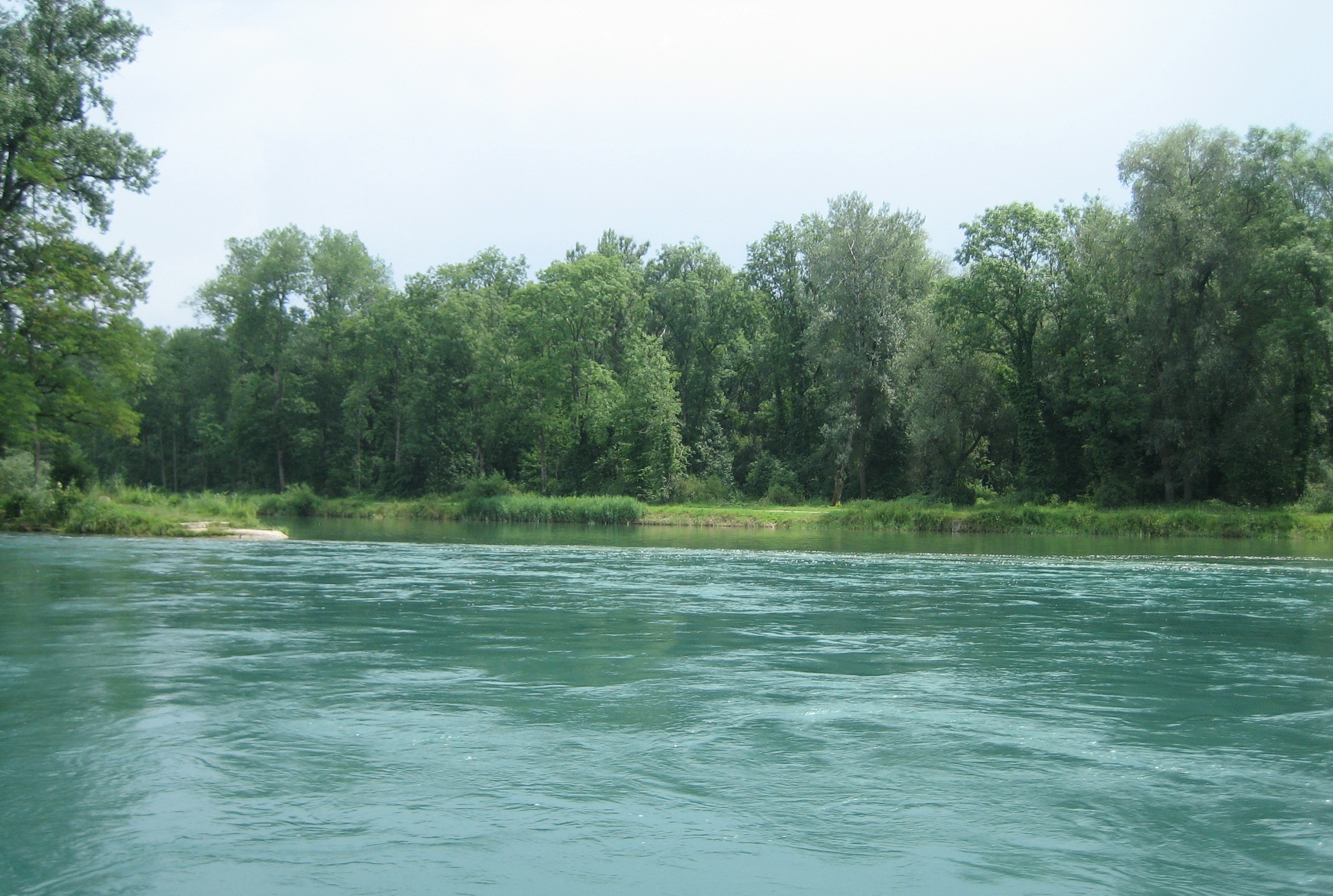 Thurmündung in den Rhein